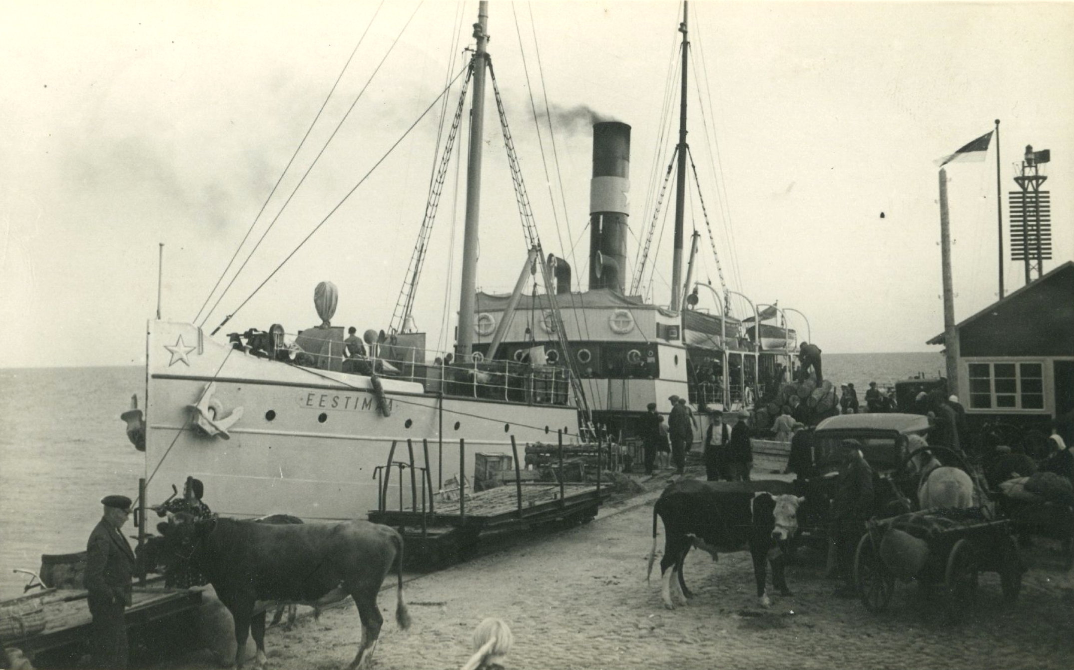 Aurik "Eestimaa" Roomassaare sadamas.